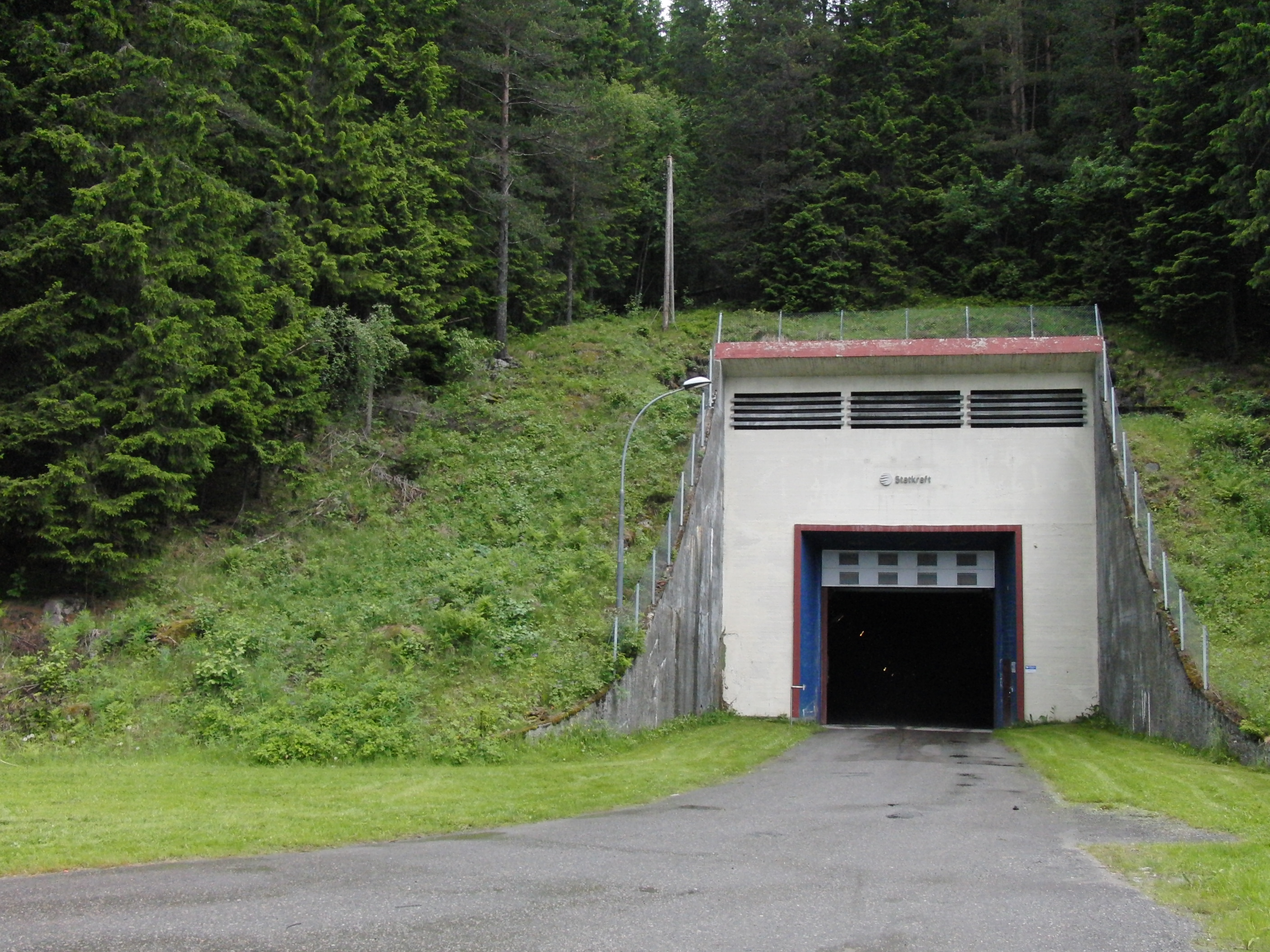 Vinje kraftstasjon